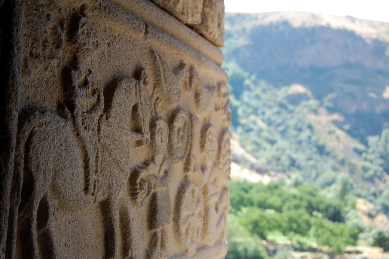 Carvings, Gndevank, Vayots Dzor, Armenia.